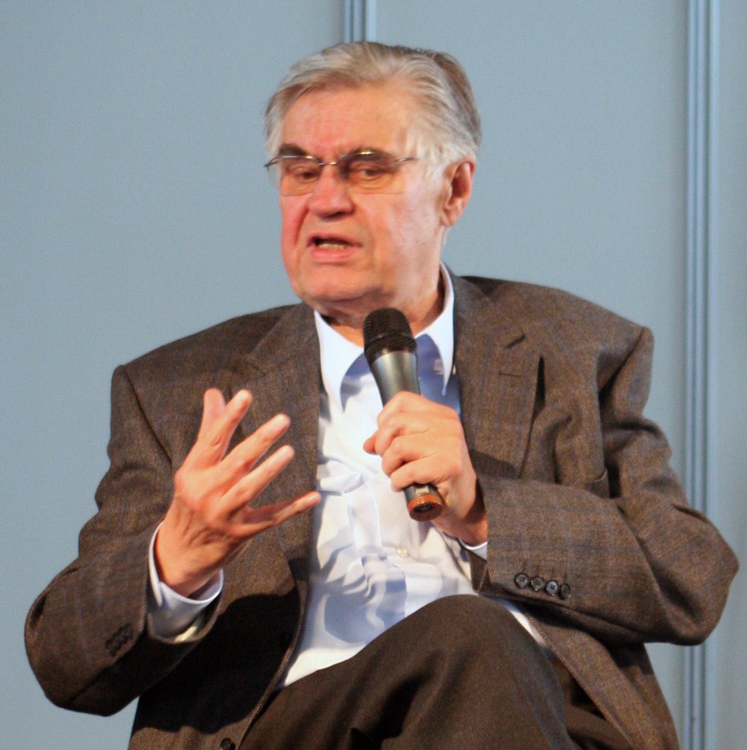 Hans Koschnik auf einer Podiumsdiskussion auf dem evangelischen Kirchentag in Bremen 2009